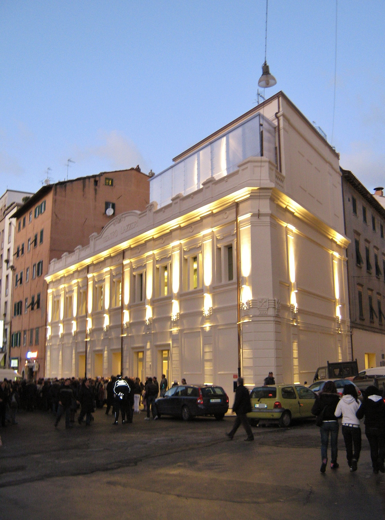 Livorno - Inaugurazione della libreria Edison, presso l'ex teatro Lazzeri